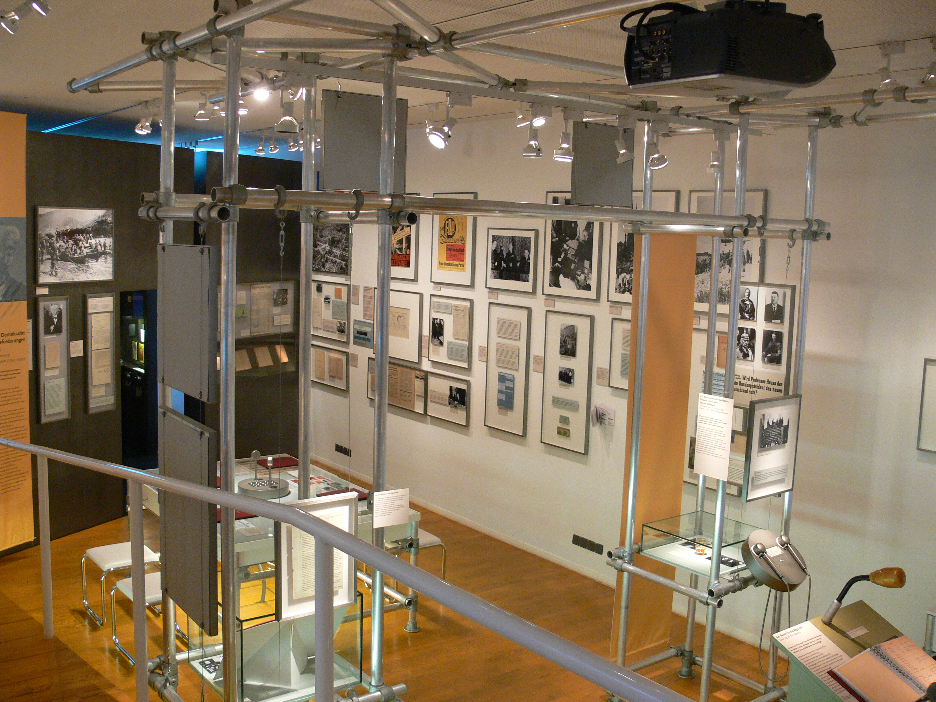 Theodor-Heuss-Haus, Feuerbacher Weg, Stuttgart-Nord Dauerausstellung